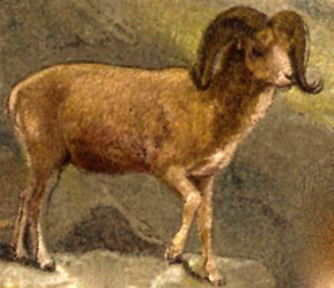 Brockhaus Kleines Konversations-Lexikon (5. Auflage 1911), detail, image